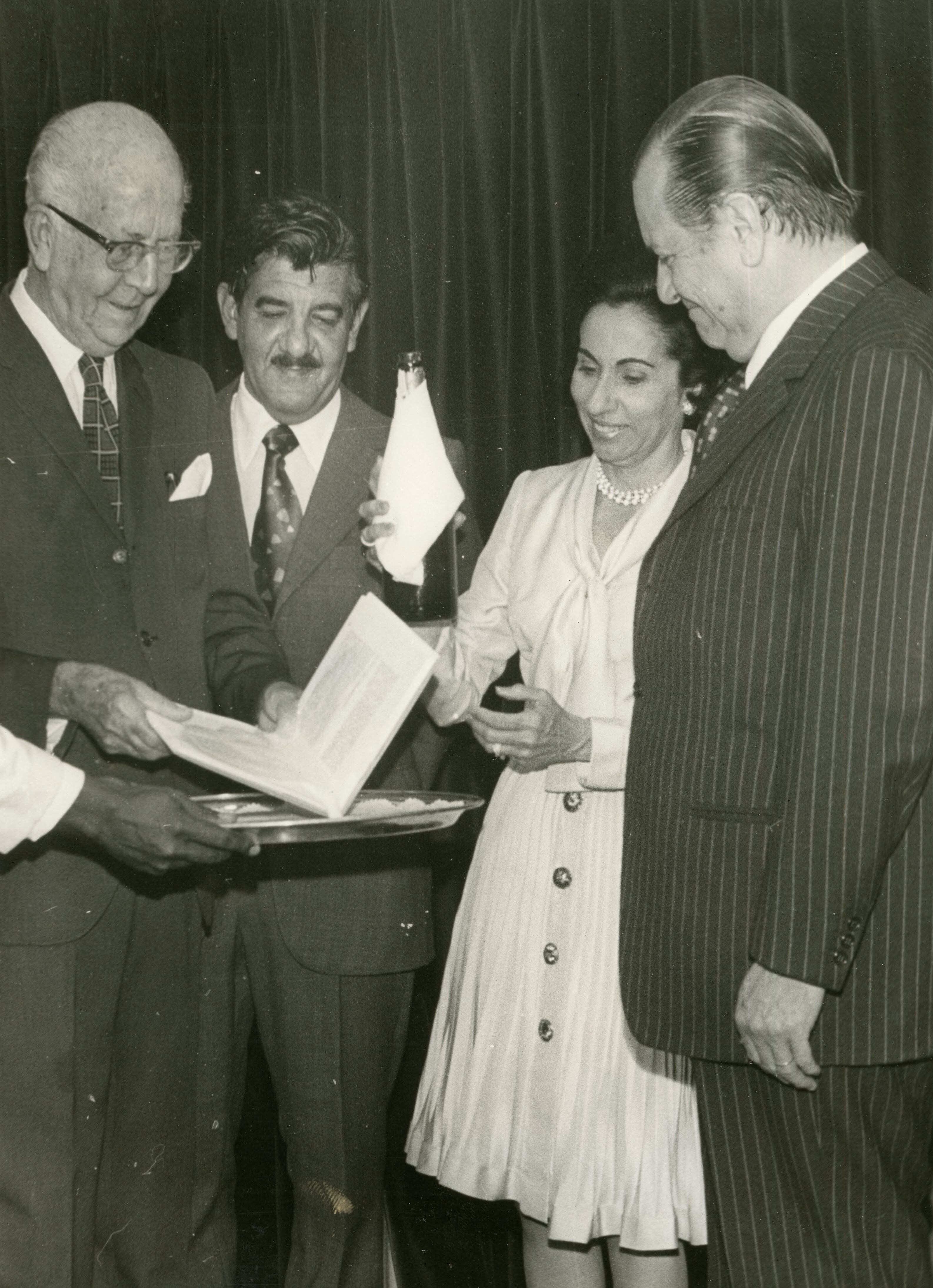 Rafael Caldera, junto a Augusto Mijares, José Antonio Pérez Díaz y Alicia Pietri, en la presentación de una nueva edición de su libro Moldes para la fragua.